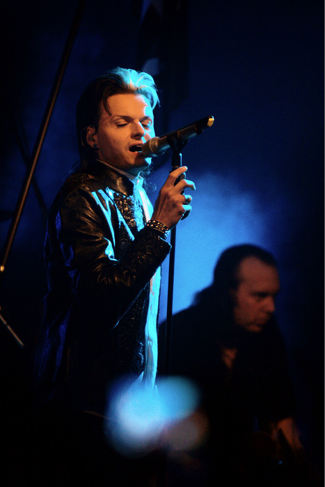 Lacrimosa